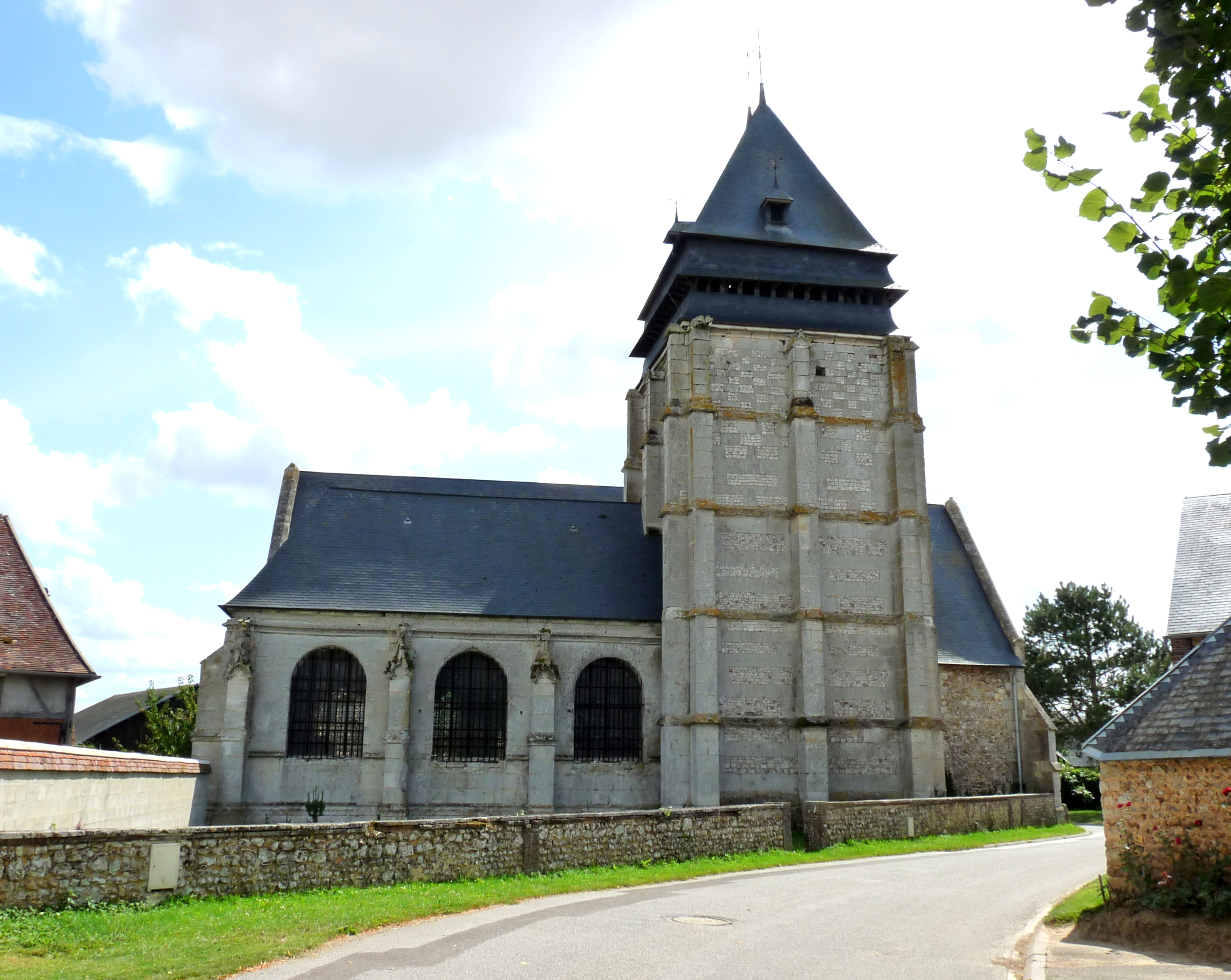 Église Notre-Dame de Prey